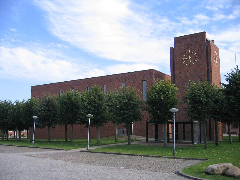 Abildgaard Kirke outside